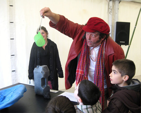 Antton Etxeberria aktorea Donostiako Untzi Museoan